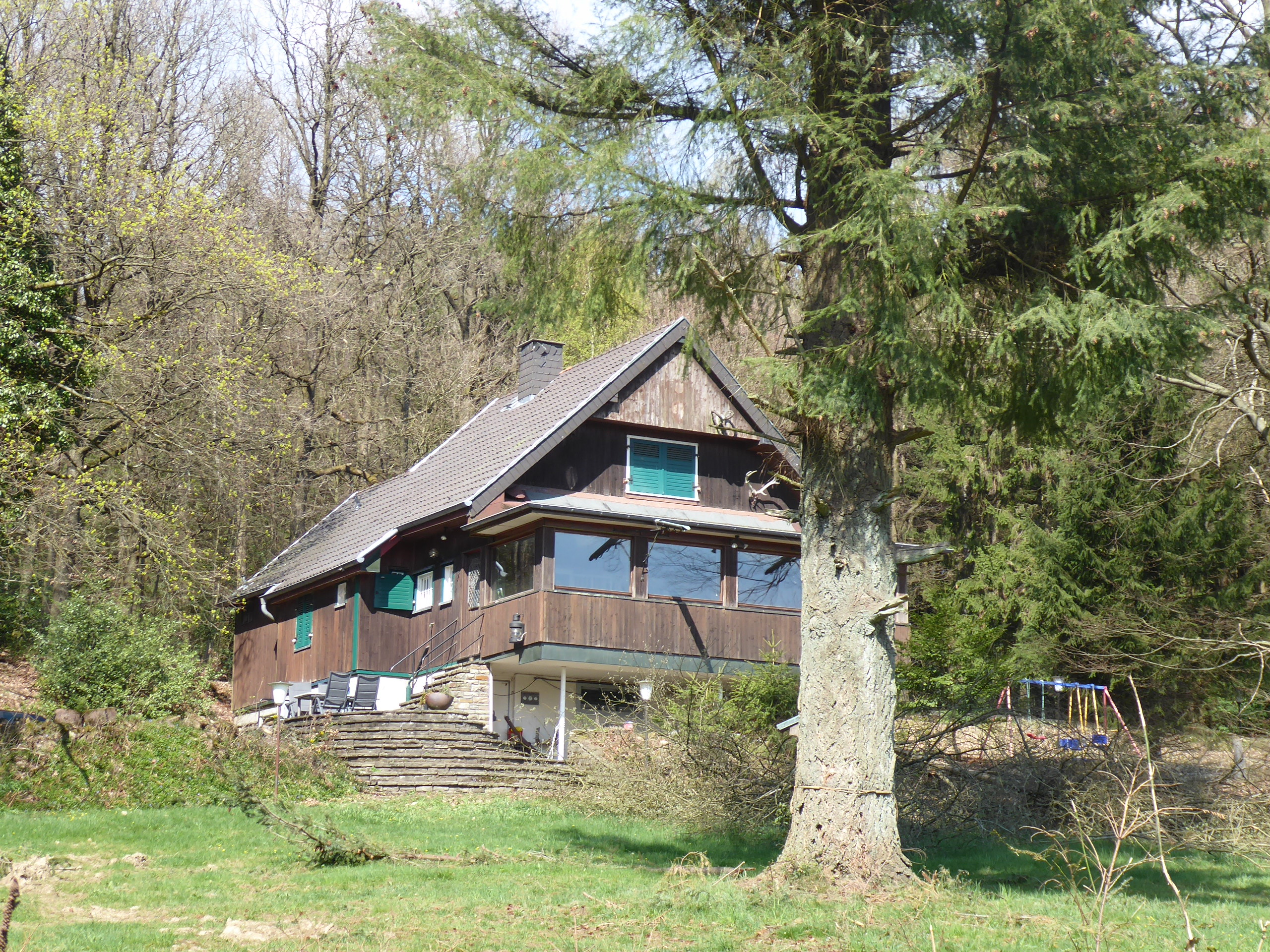 Forsthaus in Much-Heckhaus. Drehort für das fiktive "Hengasch" in der Fernsehserie "Mord mit Aussicht".